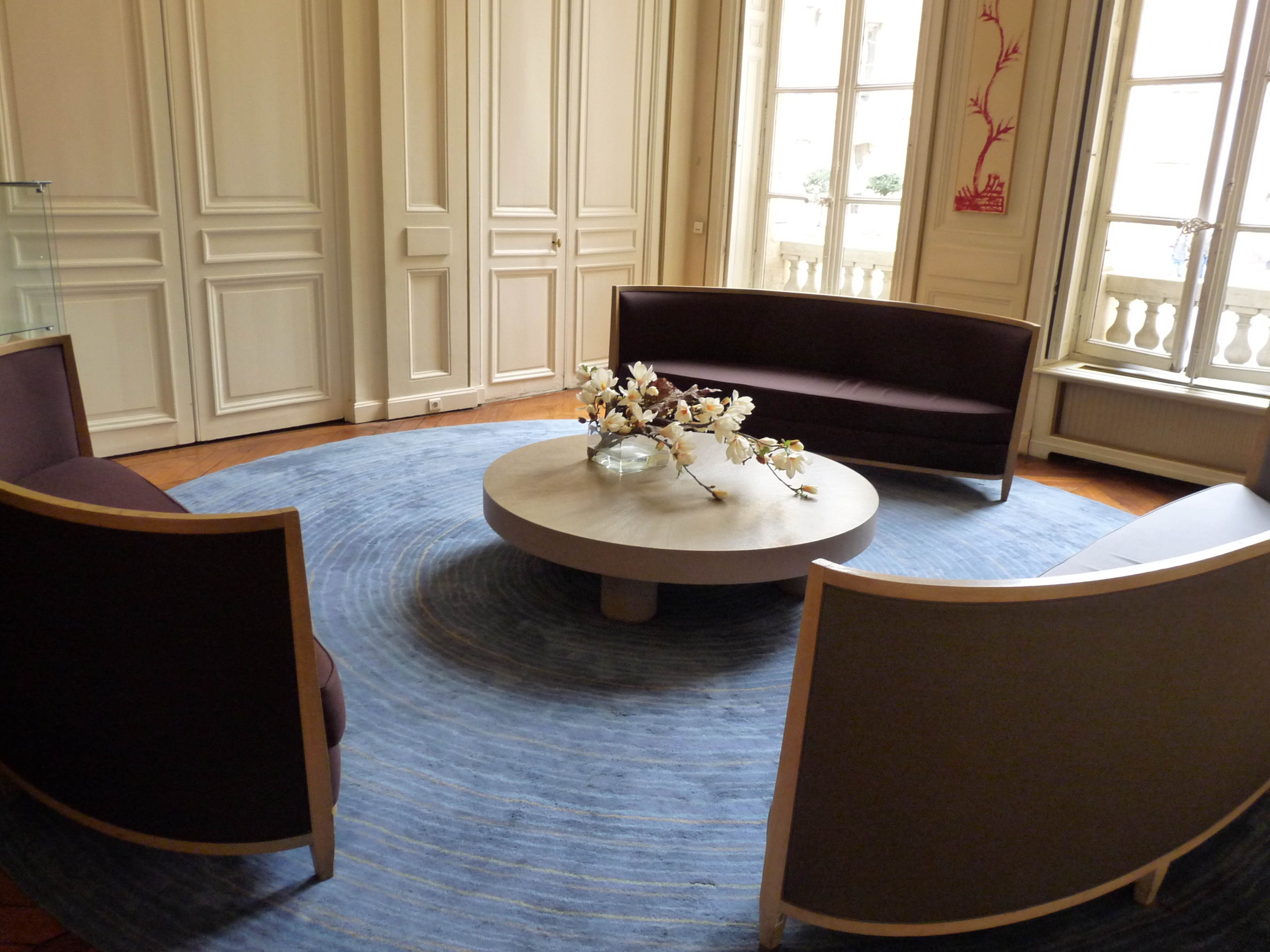 Le salon des Alchinsky à l'hôtel de Rochechouart à Paris, siège du ministère de l'éducation nationale. Photo prise lors des journées du patrimoine 2011.